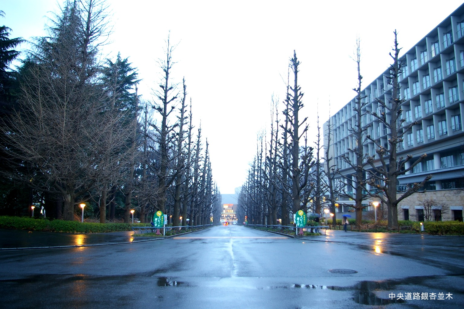 塾生 (talk) 09:47, 12 February 2010 (UTC)